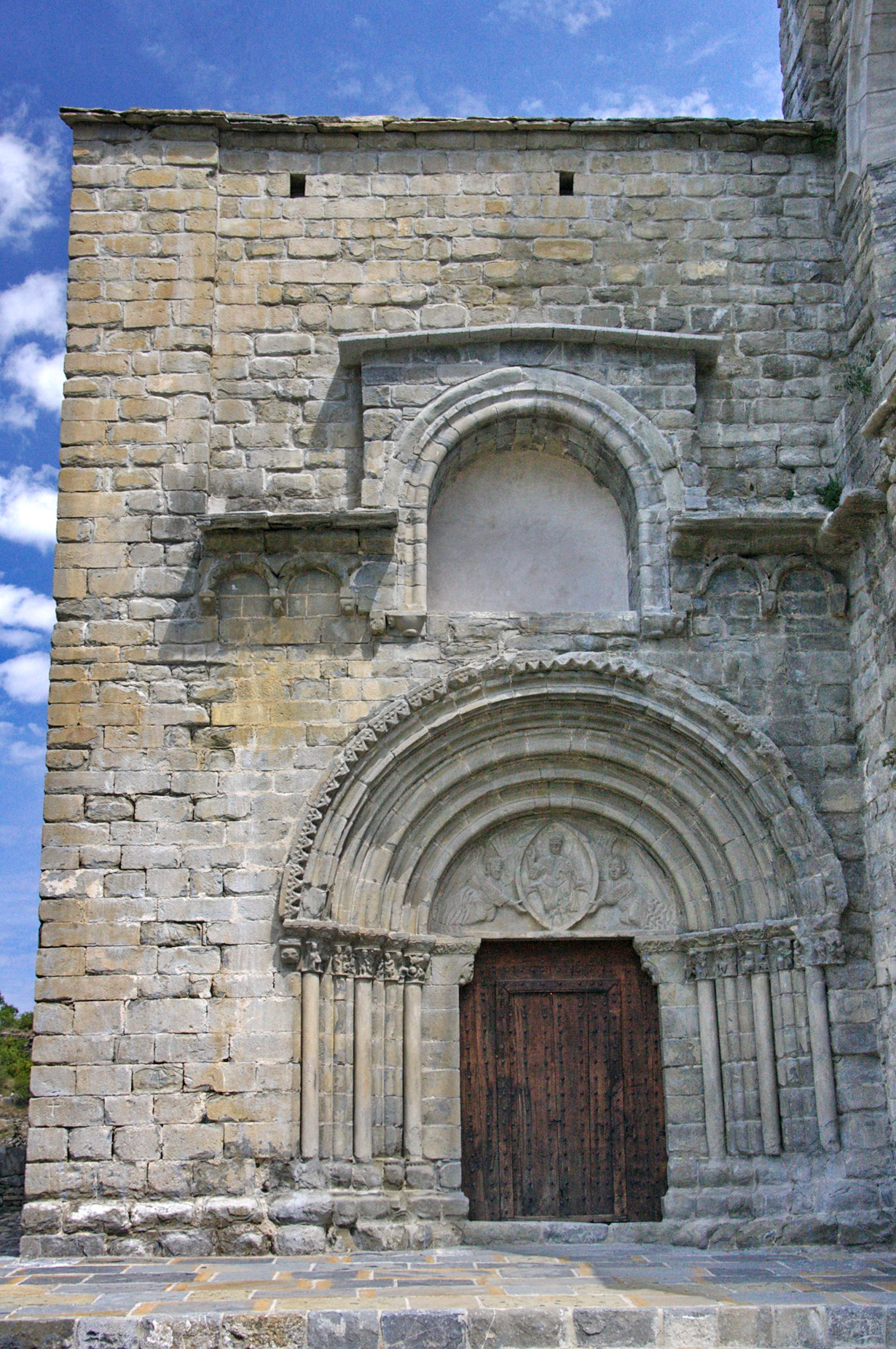 Portalada de la Mare de Déu de Baldós a Montanyana (la Franja-Osca)